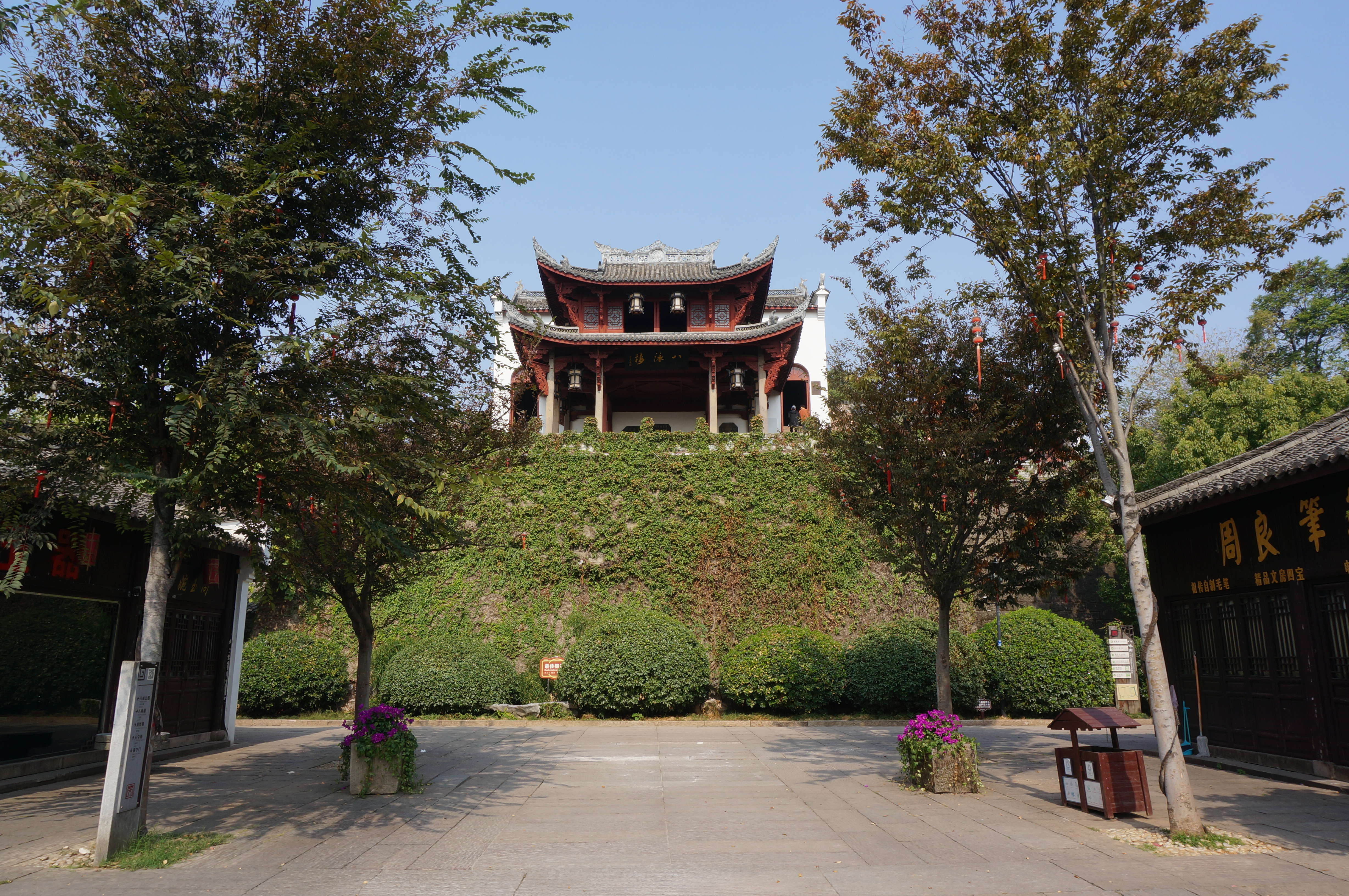 八咏楼，南面。